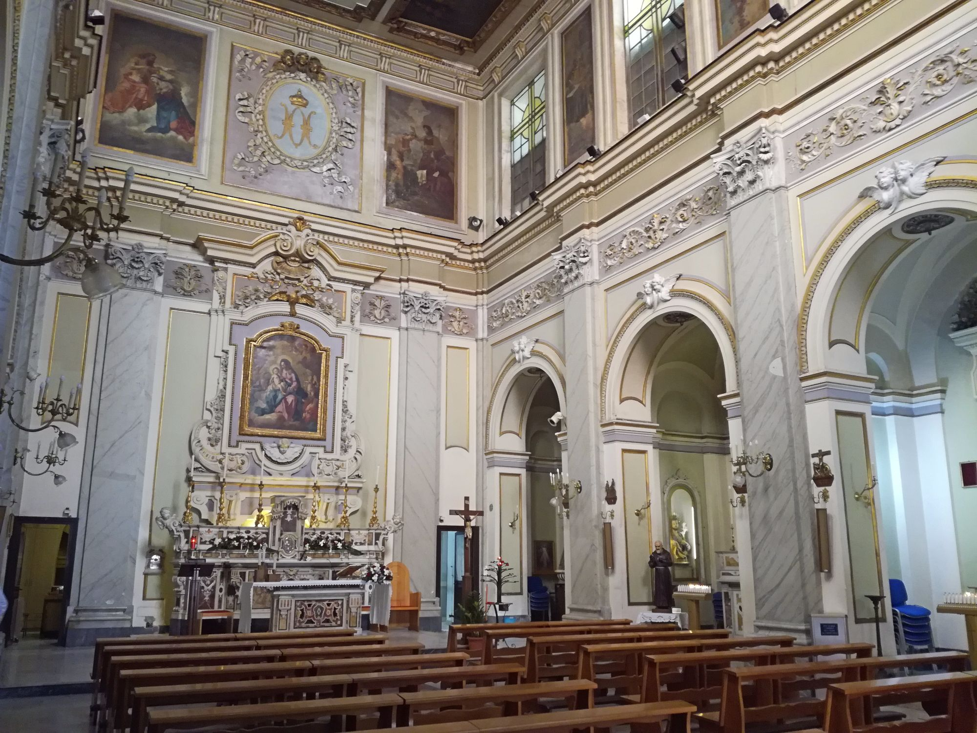 Interno di Santa Maria della Scala, Napoli